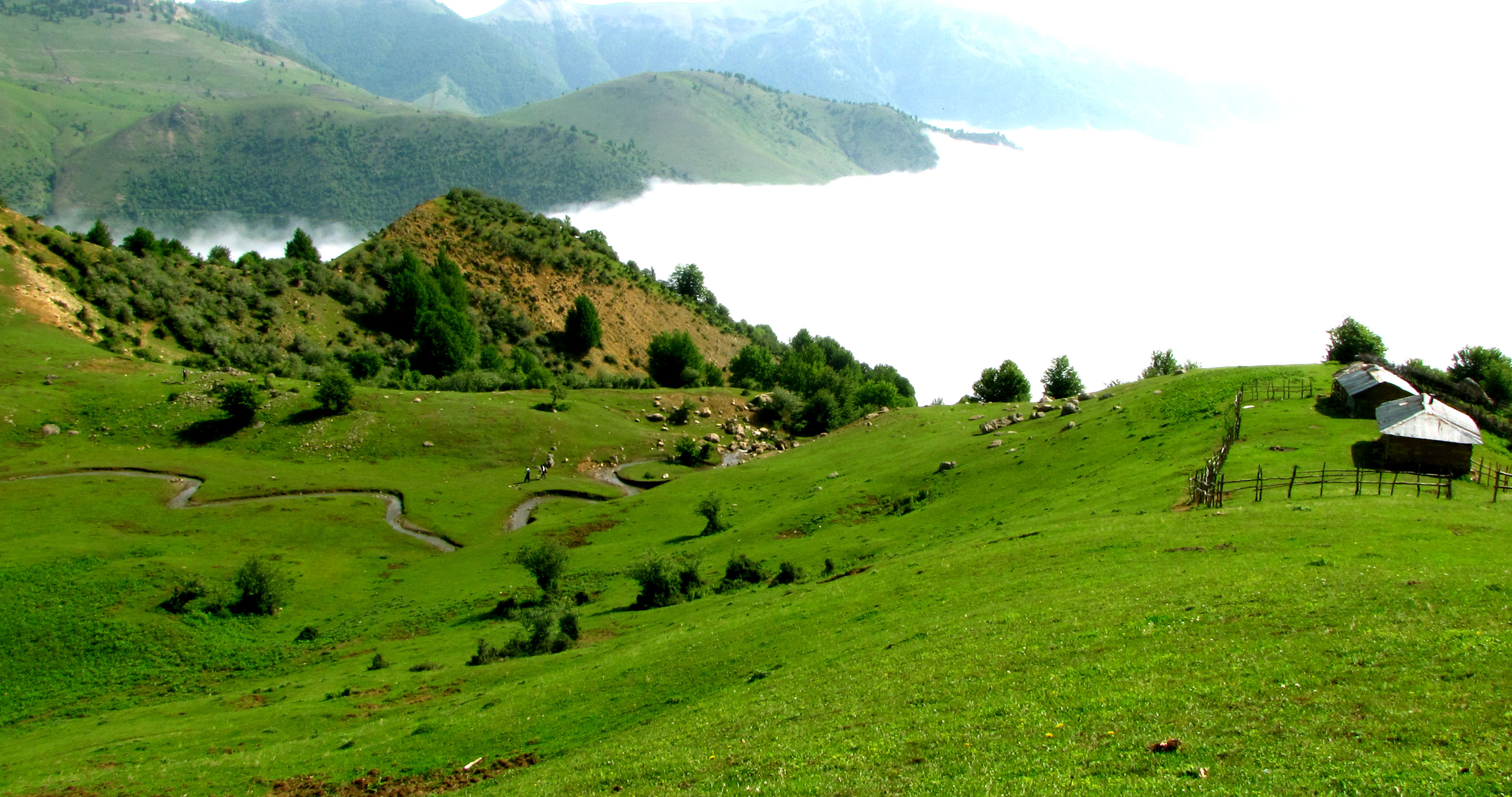 ییلاق خله دشت رمضان نیک نهاد